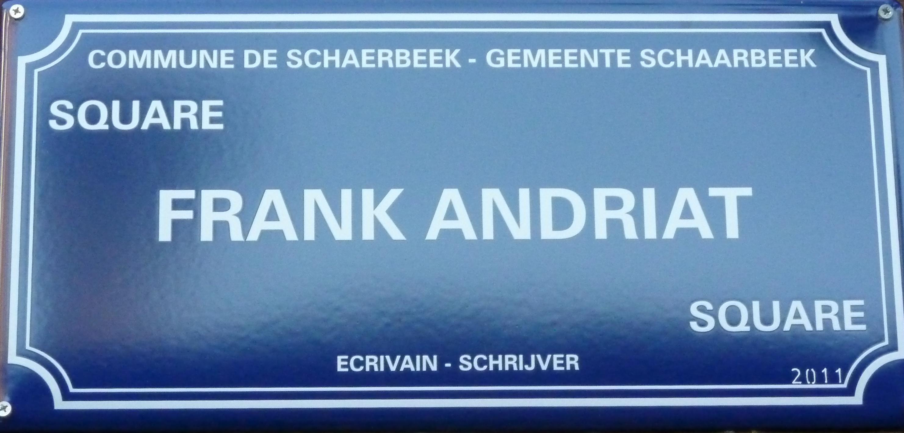 Le Mur des Célébrités à la Maison des Arts de Schaerbeek, Bruxelles, Belgique.